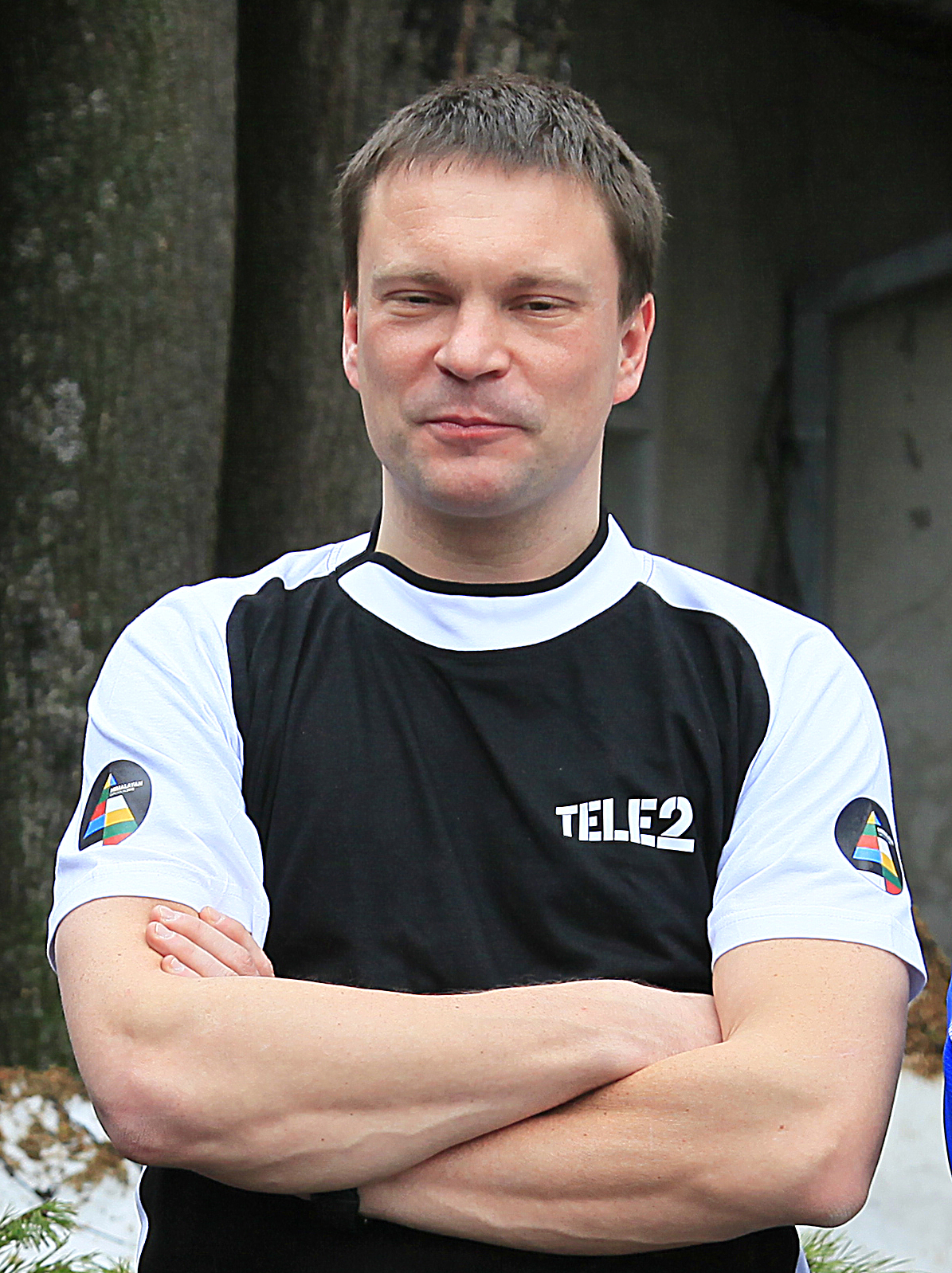 Tanel Tuuleveski